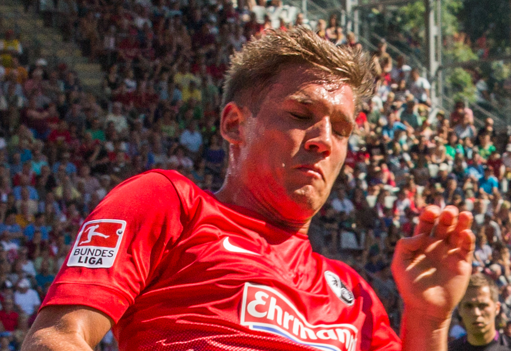 Oliver Sorg am 2. Spieltag der Saison 2013/14 (17. August 2013).